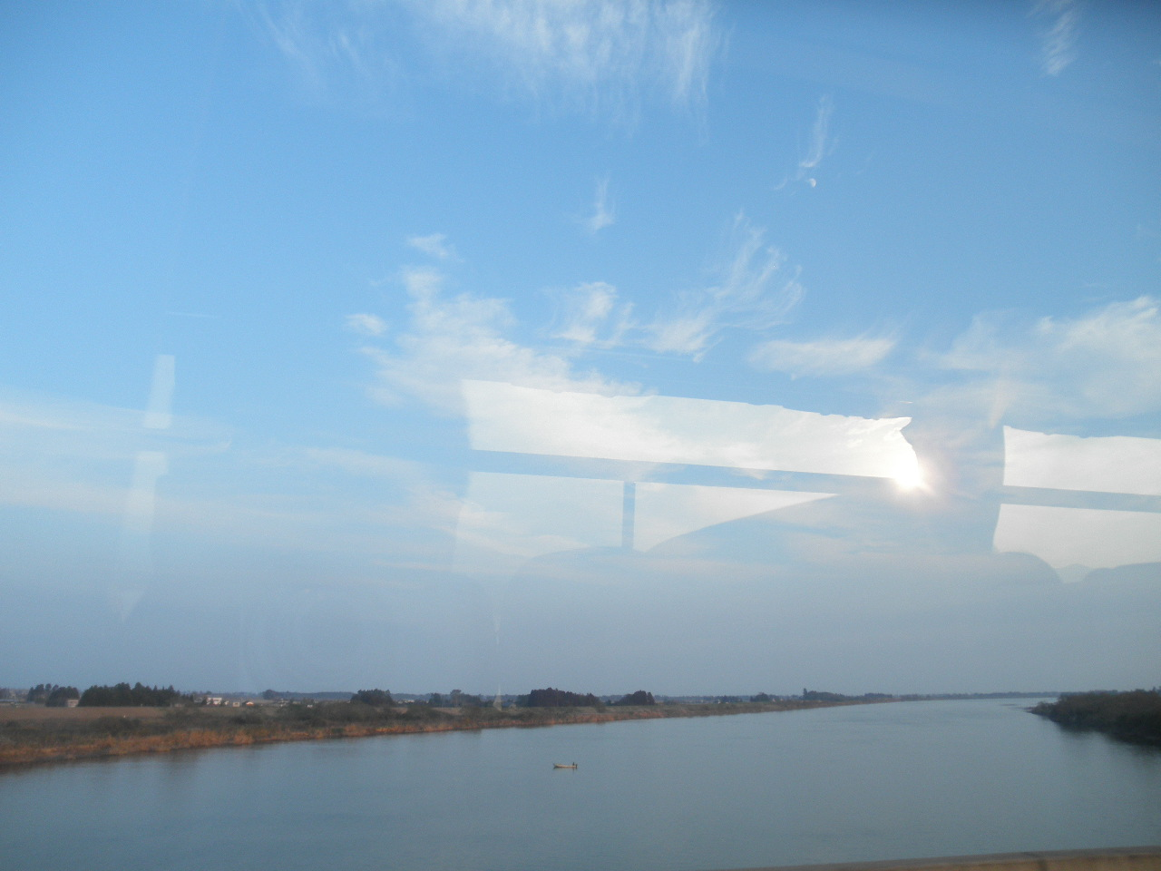 宮城県亘理郡亘理町逢隈中泉